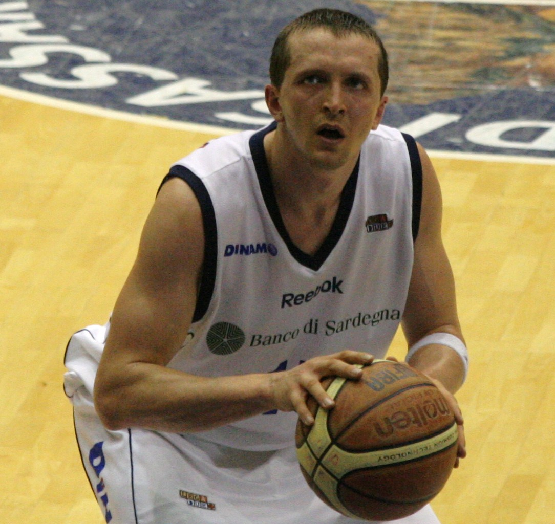 Autore: Francesco Canu Utente:Cesco77, Foto: Trent Whiting con la maglia della Dinamo Sassari